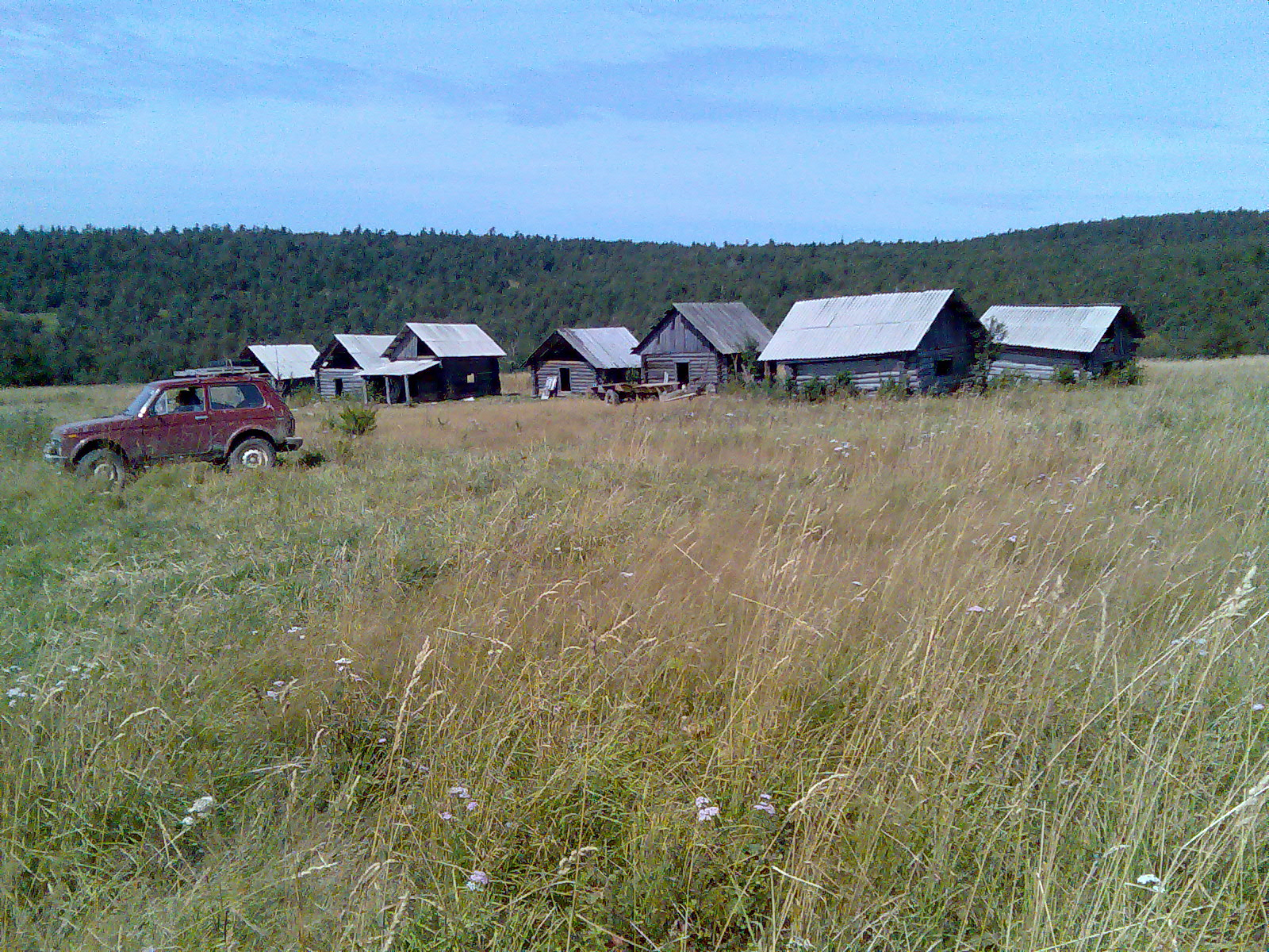 яйляу у горы Масим